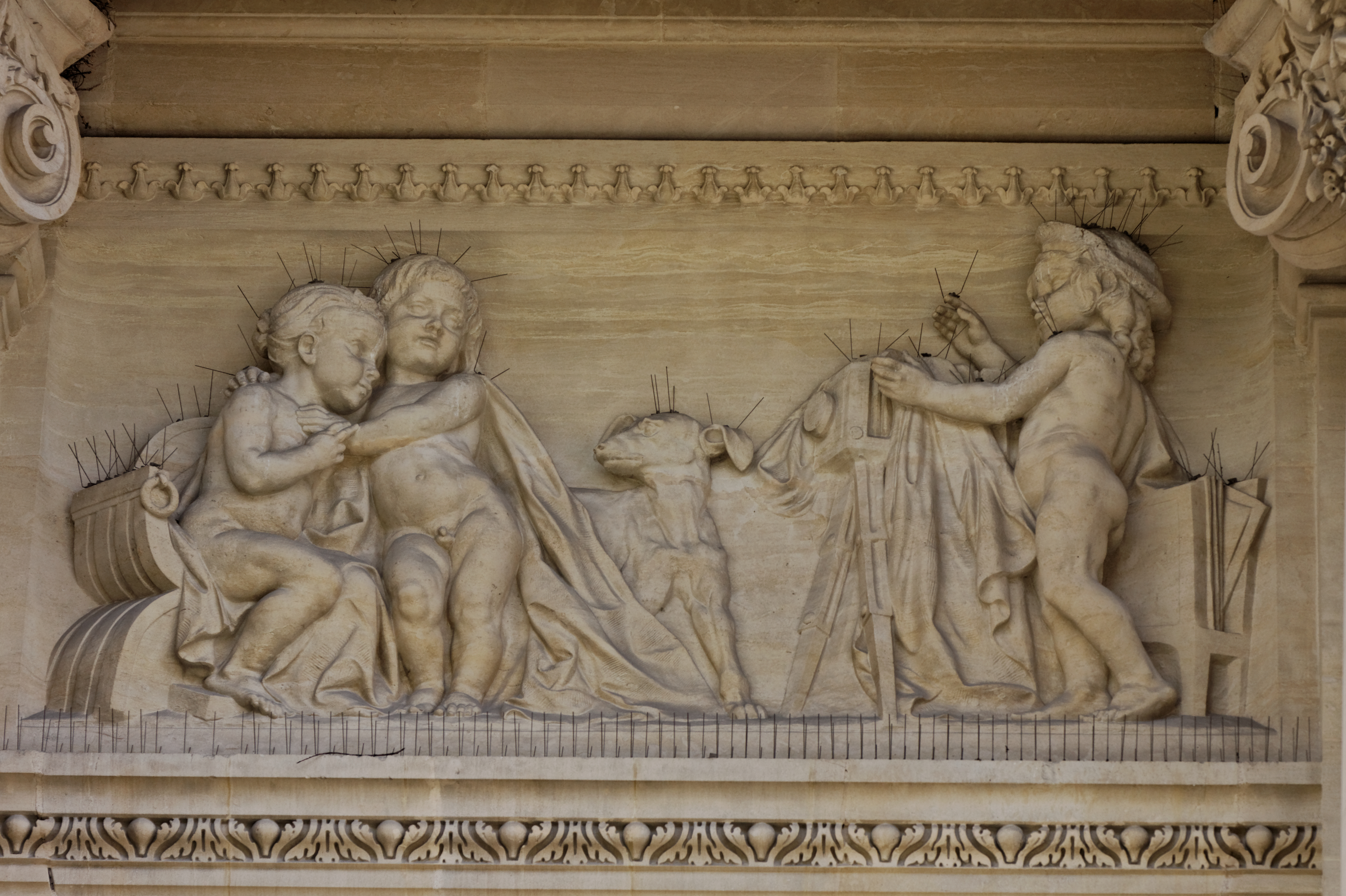 Vue de la façade du Petit Palais.